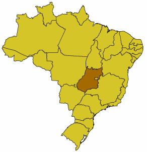 Karte Brasiliens, Goiás hervorgehoben, GFDL nach der Vorlage Bild:Brasilien Bundesstaaten.png